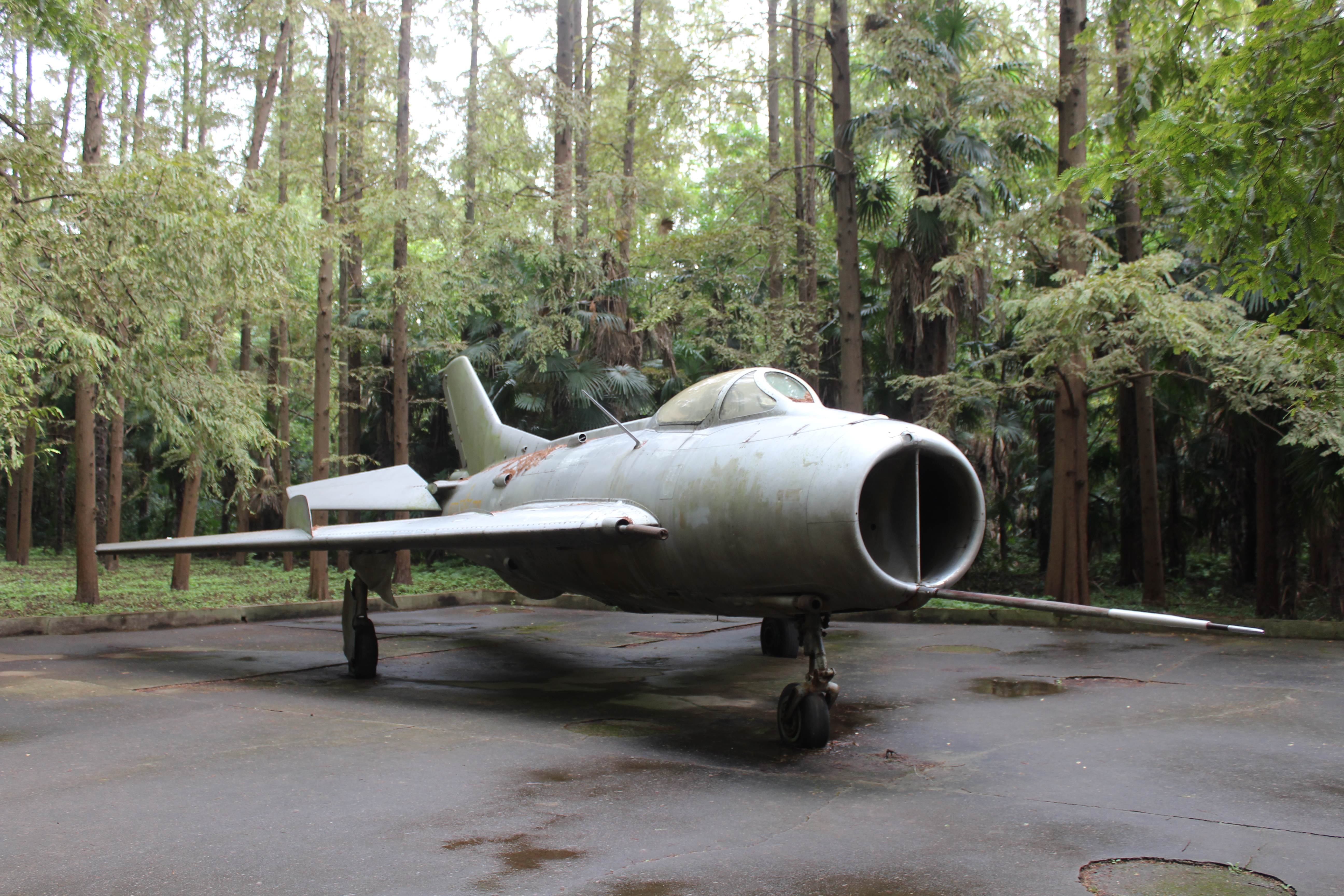 Un Shenyang J-6 (歼-6), exposé au Parc National de Dongping Île de Chongming, Municipalité de Shanghai, Chine